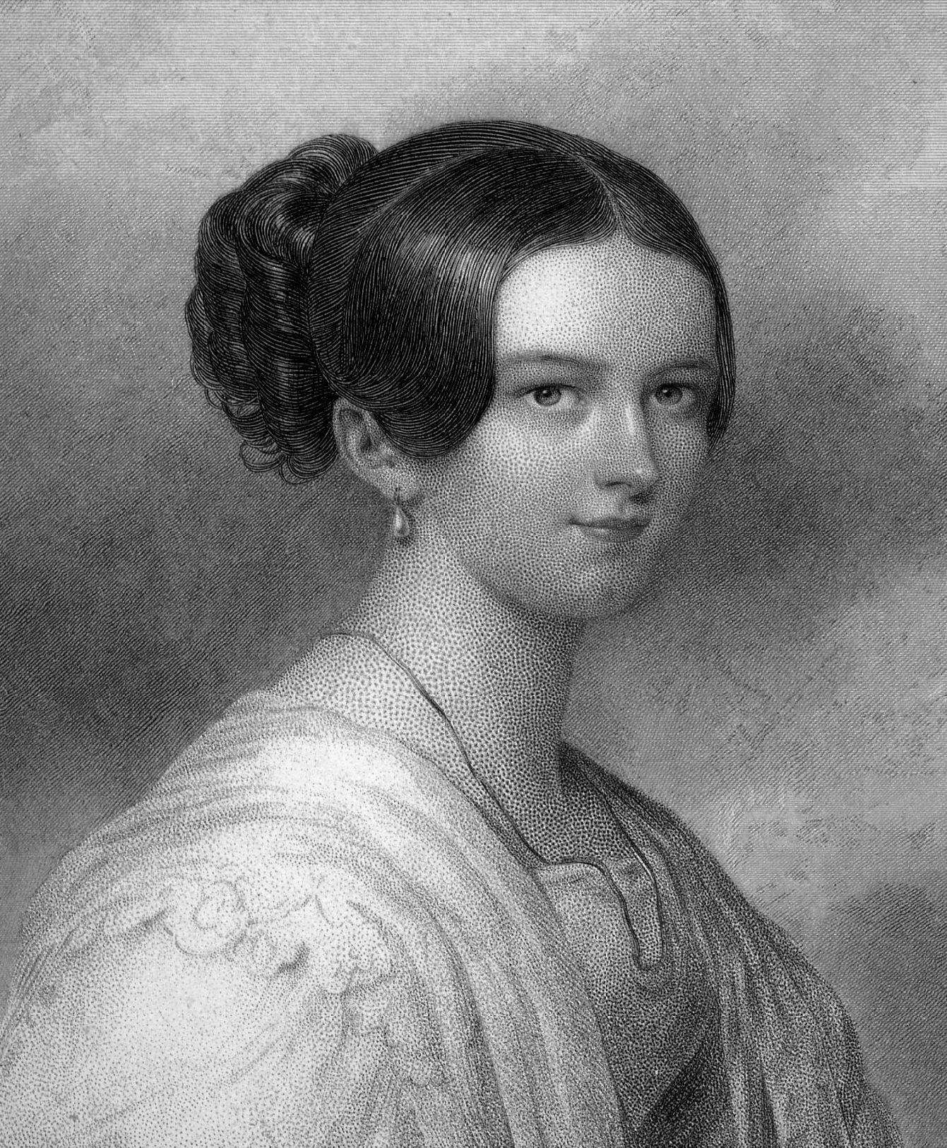 Széchenyiné Seilern Crescence (1799-1875)